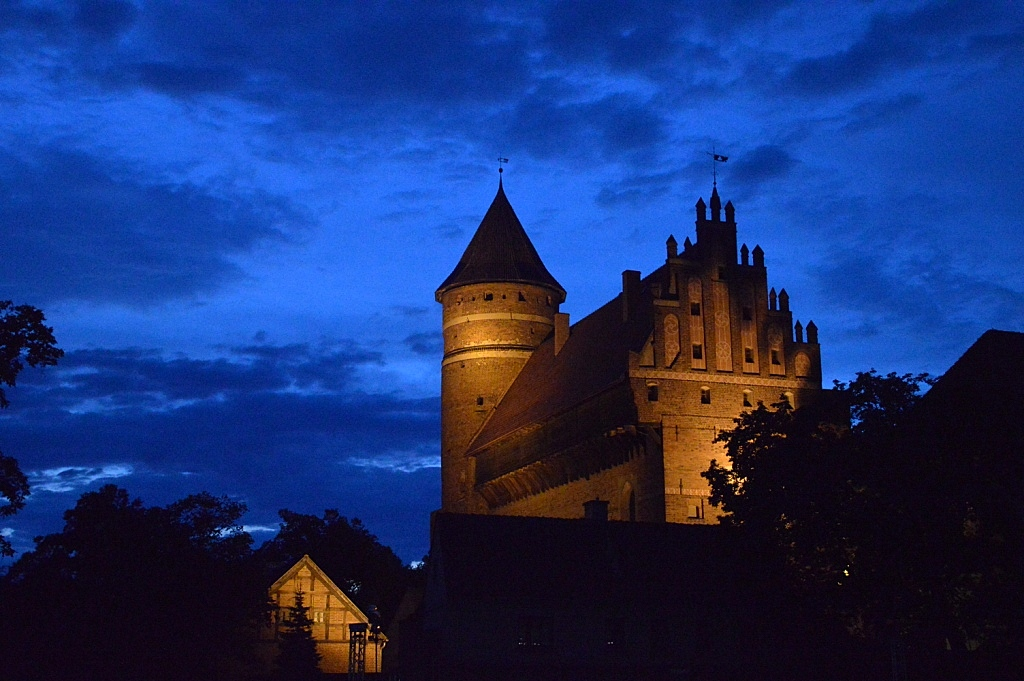 Olsztyn, zamek, ob. muzeum, XIV-XVII, XIX